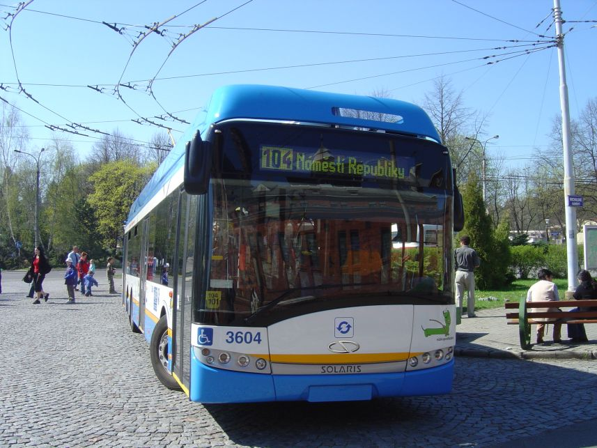 DPO Ostrava